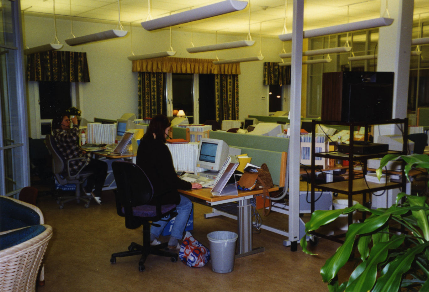 Telefonister på Östersunds telefonstation (utlandsupplysningen)